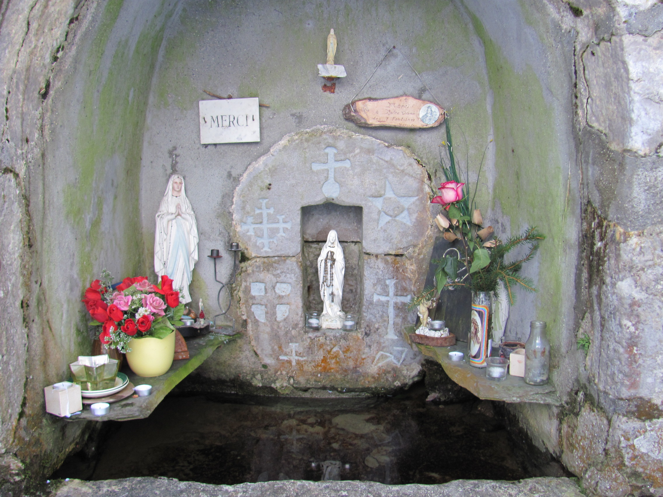 Détails de l'oratoire Notre Dame des Sept Fontaines (Plan Montmin), prise au cours de l'hiver le 27 décembre 2013